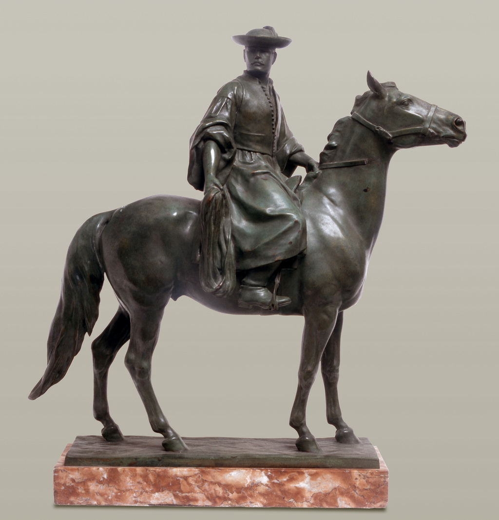 Lóháton ülő csikós szobra, 1937 (Vastagh Éva szobra), Budapest, Magyar Nemzeti Galéria